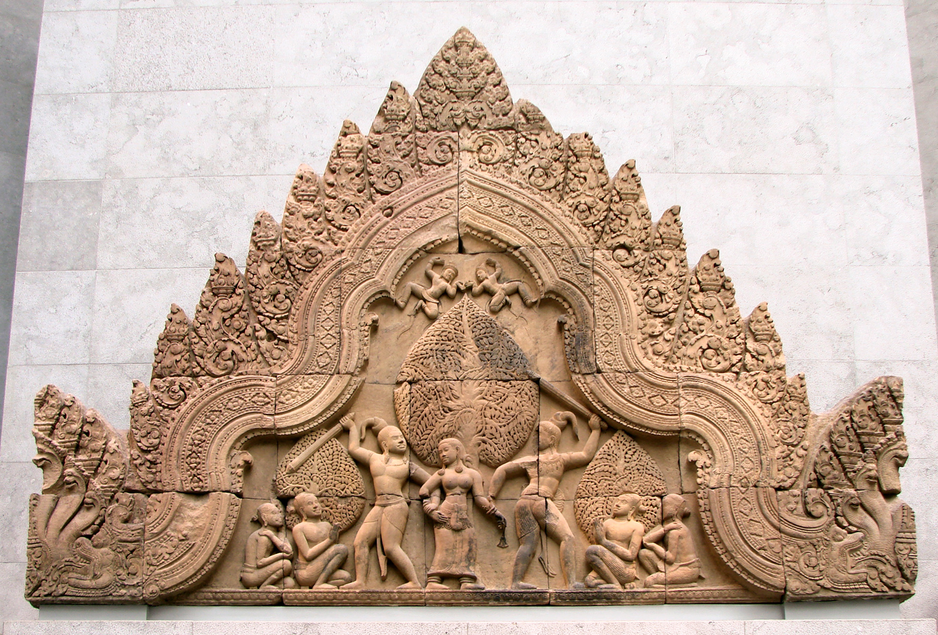 Fronton; les asura Sunda et Upasunda se disputant l'apsara Tilattama. Cambodge, province de Siemreap, Banteay Srei, vers 967. Grès. Musée Guimet, Paris.